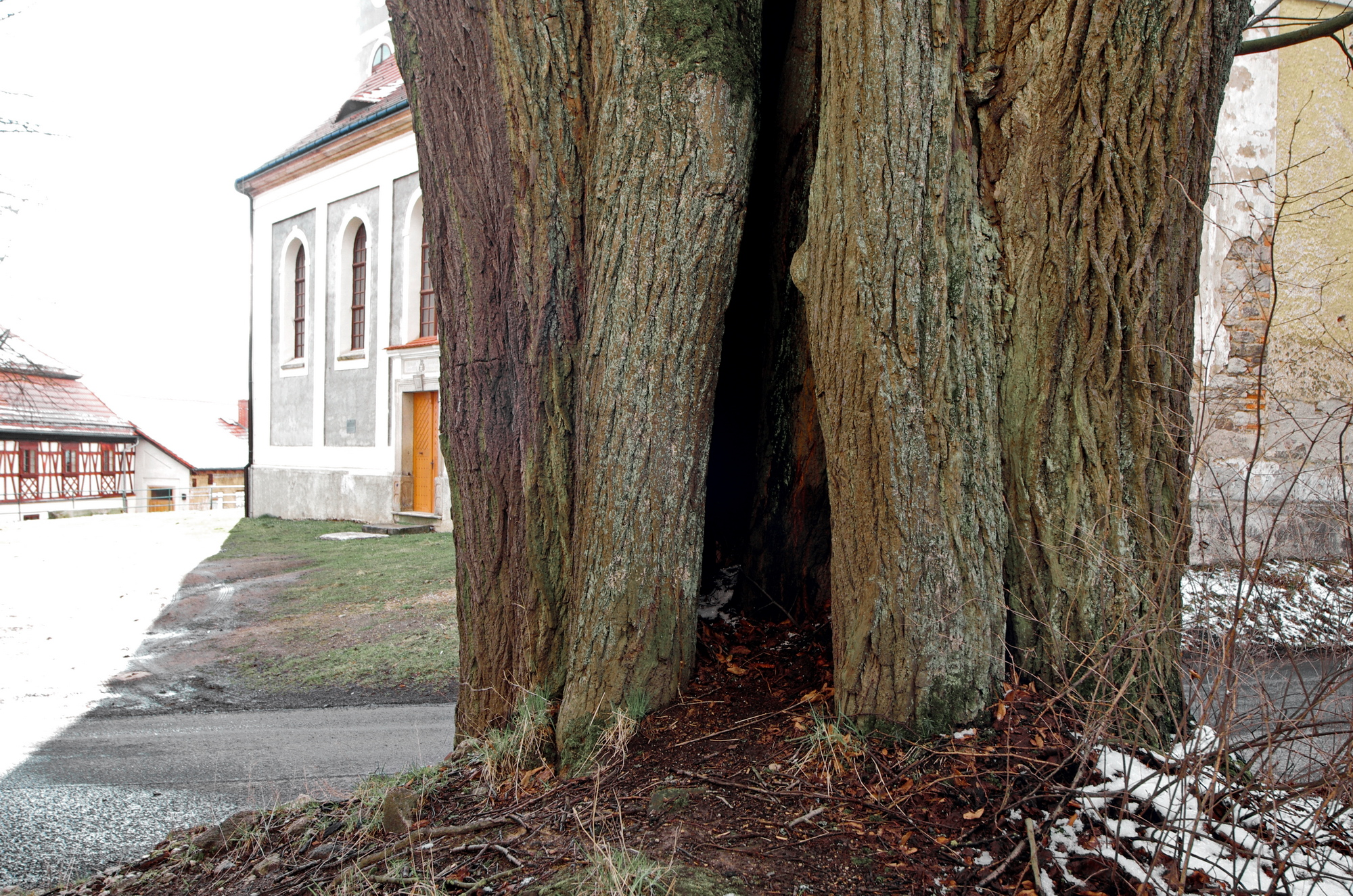 památný strom Lípa u kostela (Kostelní Bříza), okres Sokolov